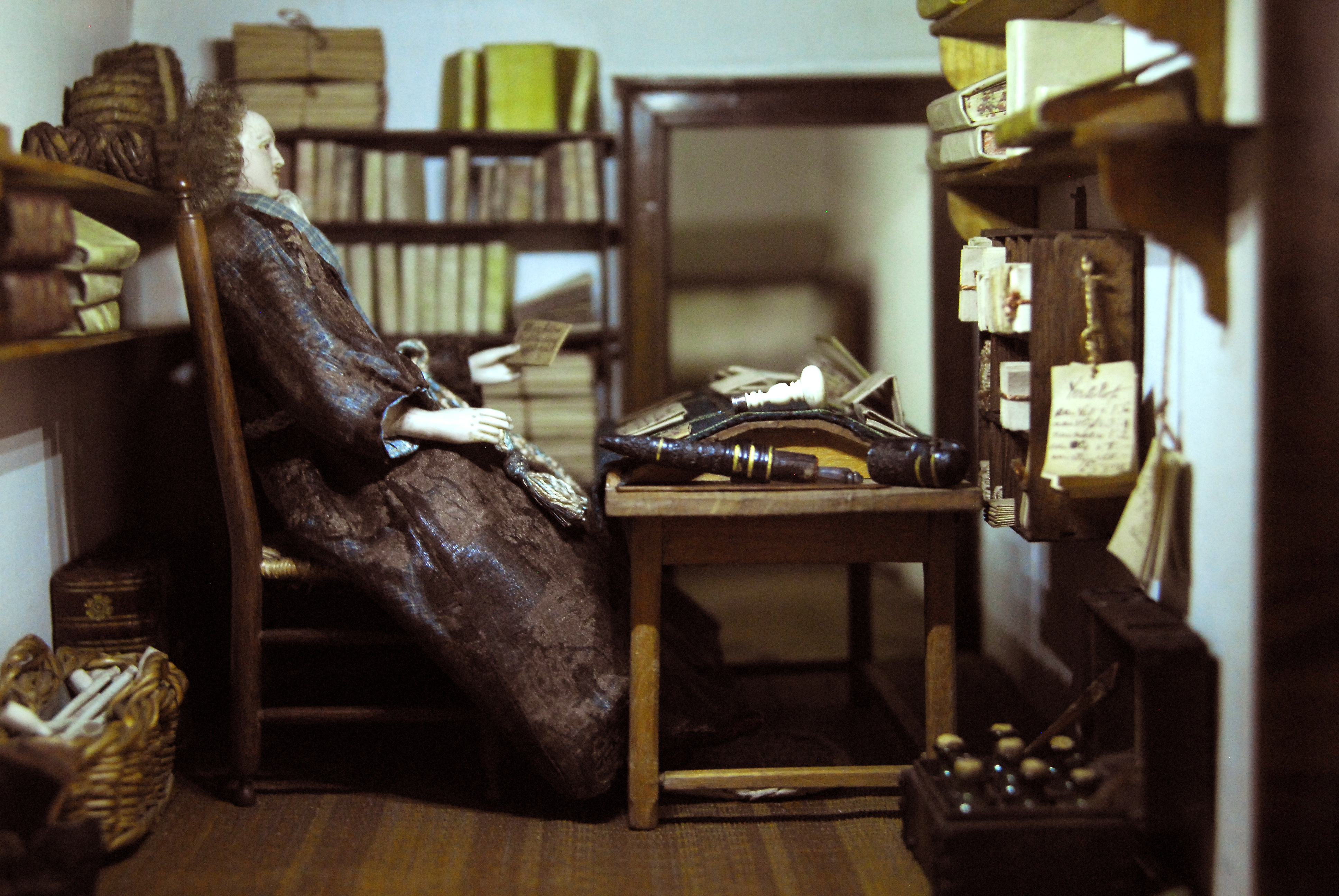 Het Comptoir (kantoor) in het poppenhuis van Petronella de la Court, Amsterdam 1670-1680. Dit poppenhuis bevindt zich in het Centraal Museum te Utrecht, Nederland.